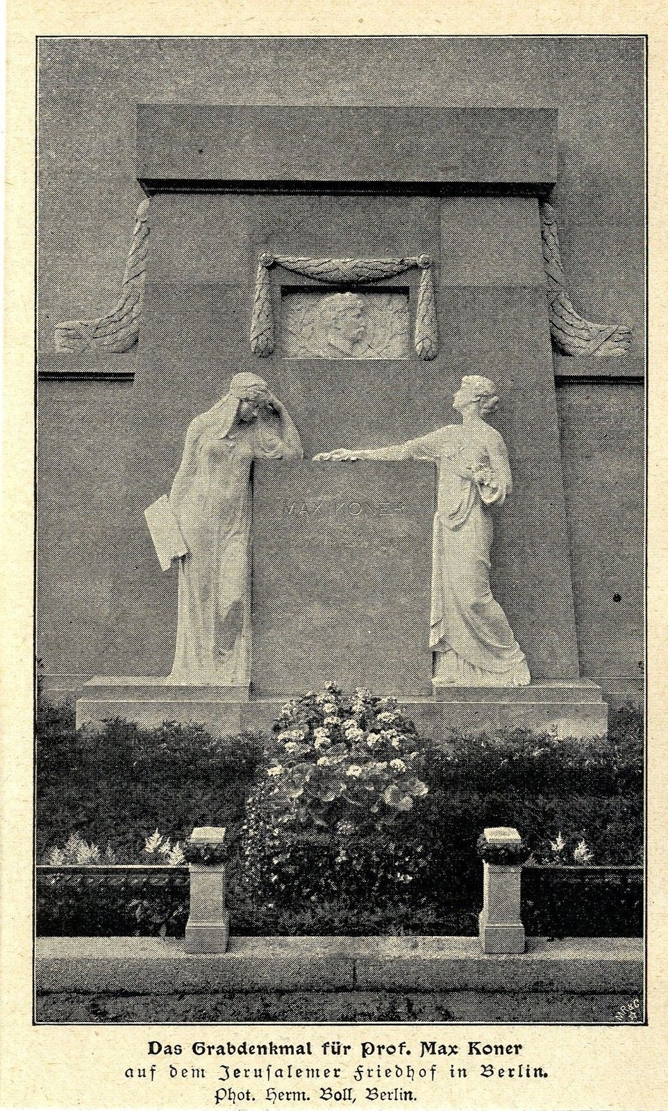 Das (ehemalige) Grabdenkmal für Max Koner auf dem Jerusalemer Friedhof I in Berlin, geschaffen von Fritz Klimsch